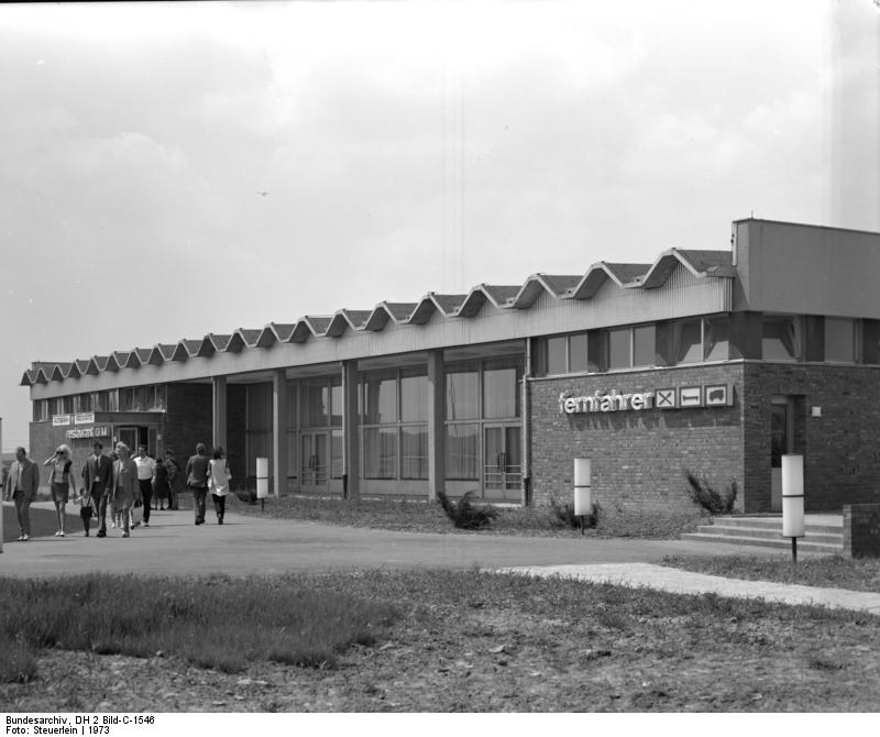 Wilsdruff, Autobahnraststätte Wilsdruff Bez. Dresden Autobahn-Raststätte [Wilsdruff.- Bezirk Dresden, Autobahn-Raststätte]